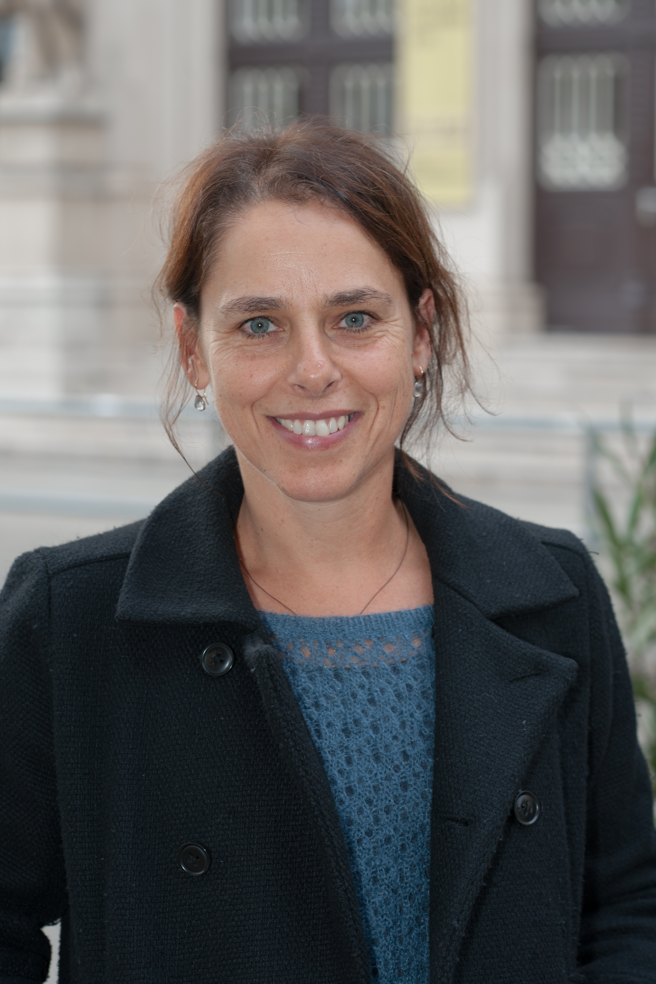 Viennale 2015: Catarina Mourão